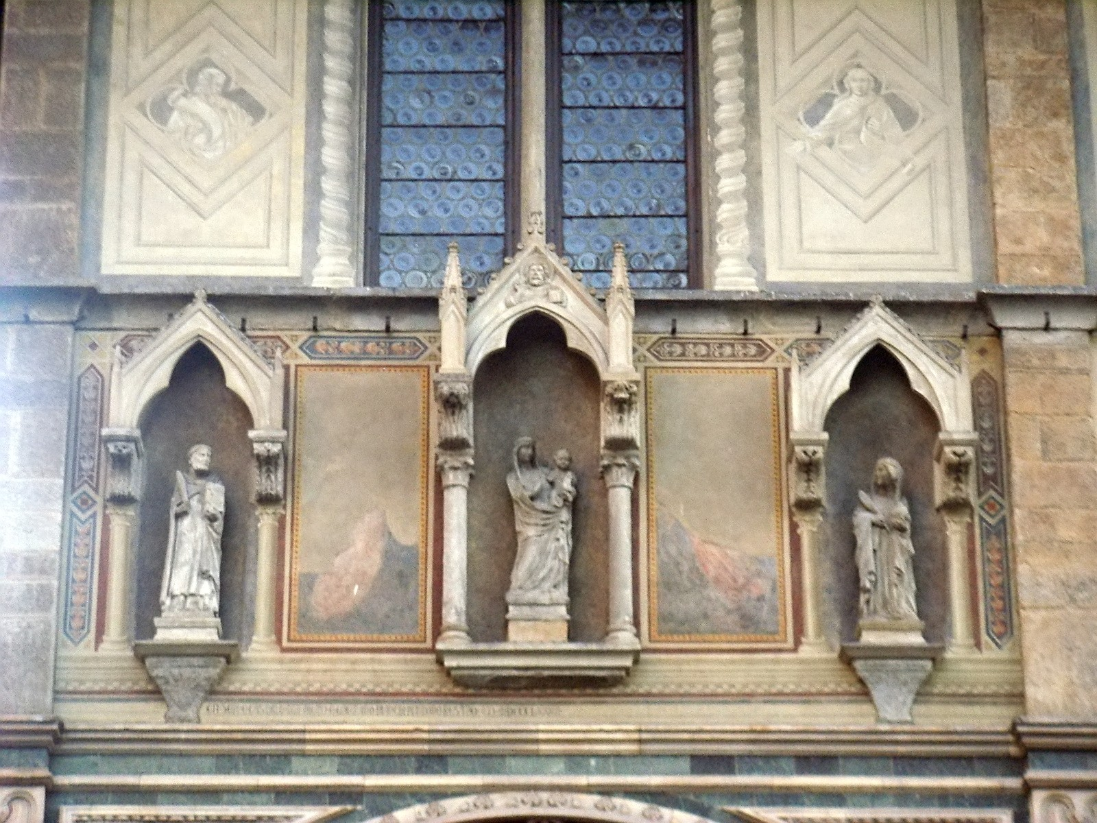 Loggia_del_Bigallo sculptures by Alberto Arnoldi in florence italy